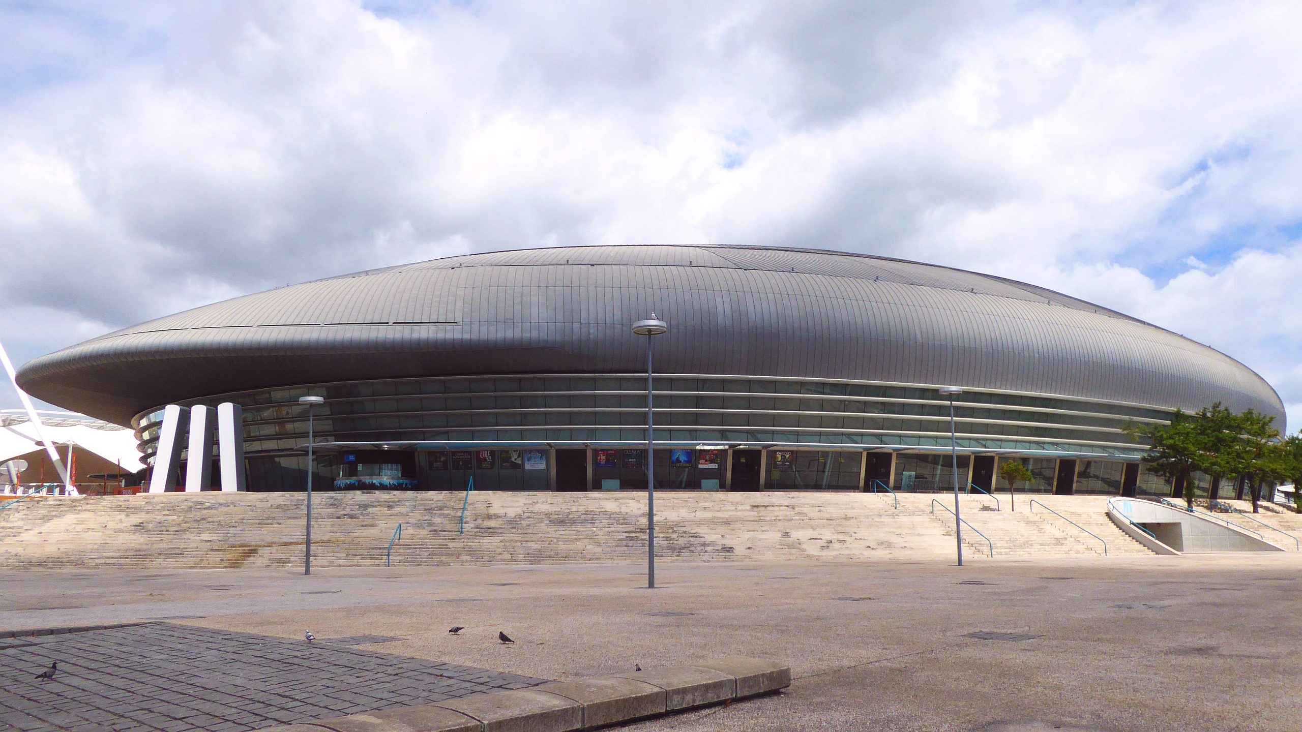 Pavilhao Atlantico EXPO 98 Parque das Nações Lisboa Portugal Foto Wolfgang Pehlemann P1080148